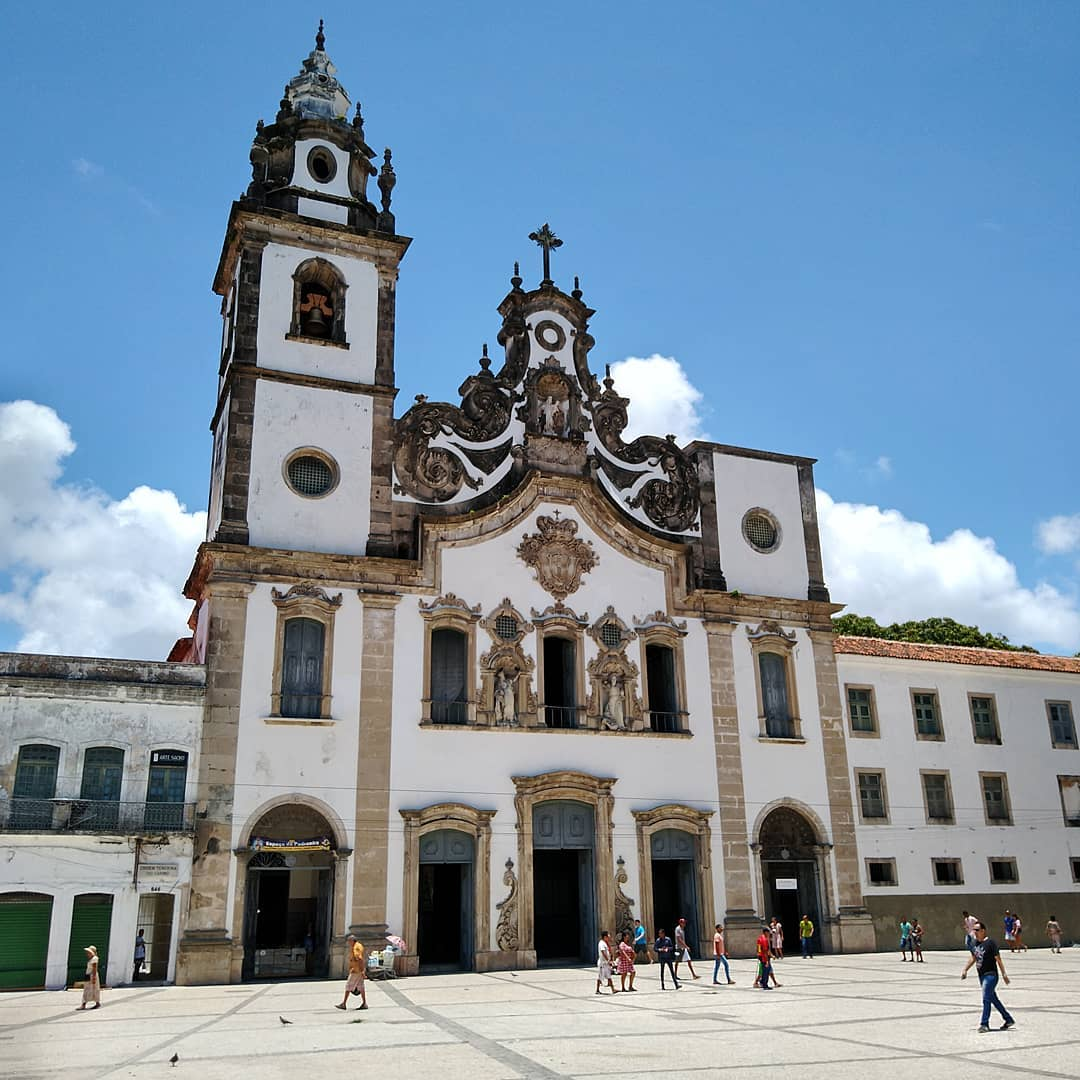 Basílica e Convento de Nossa Senhora do Carmo - Recife (PE)